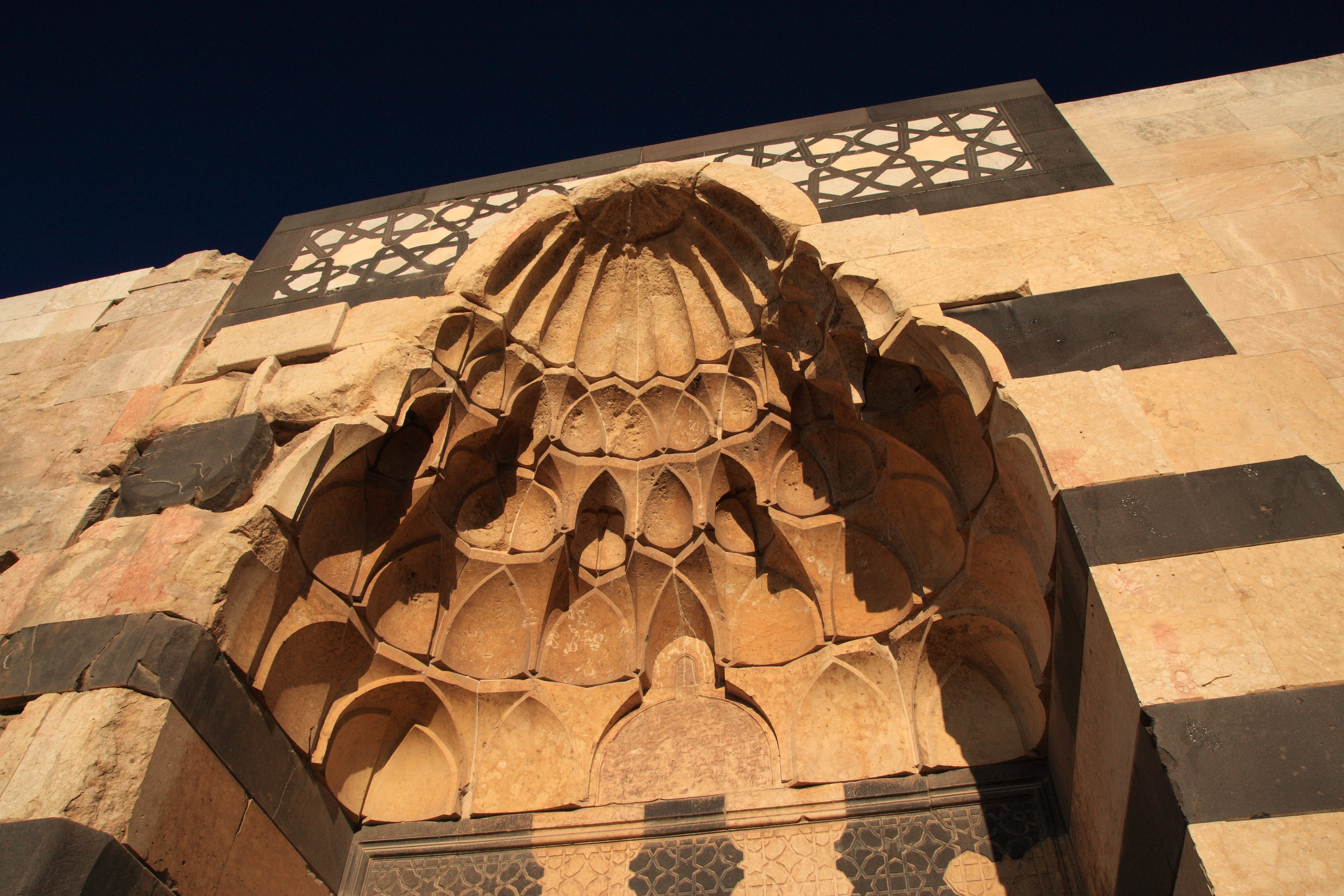 Aleppo Citadel